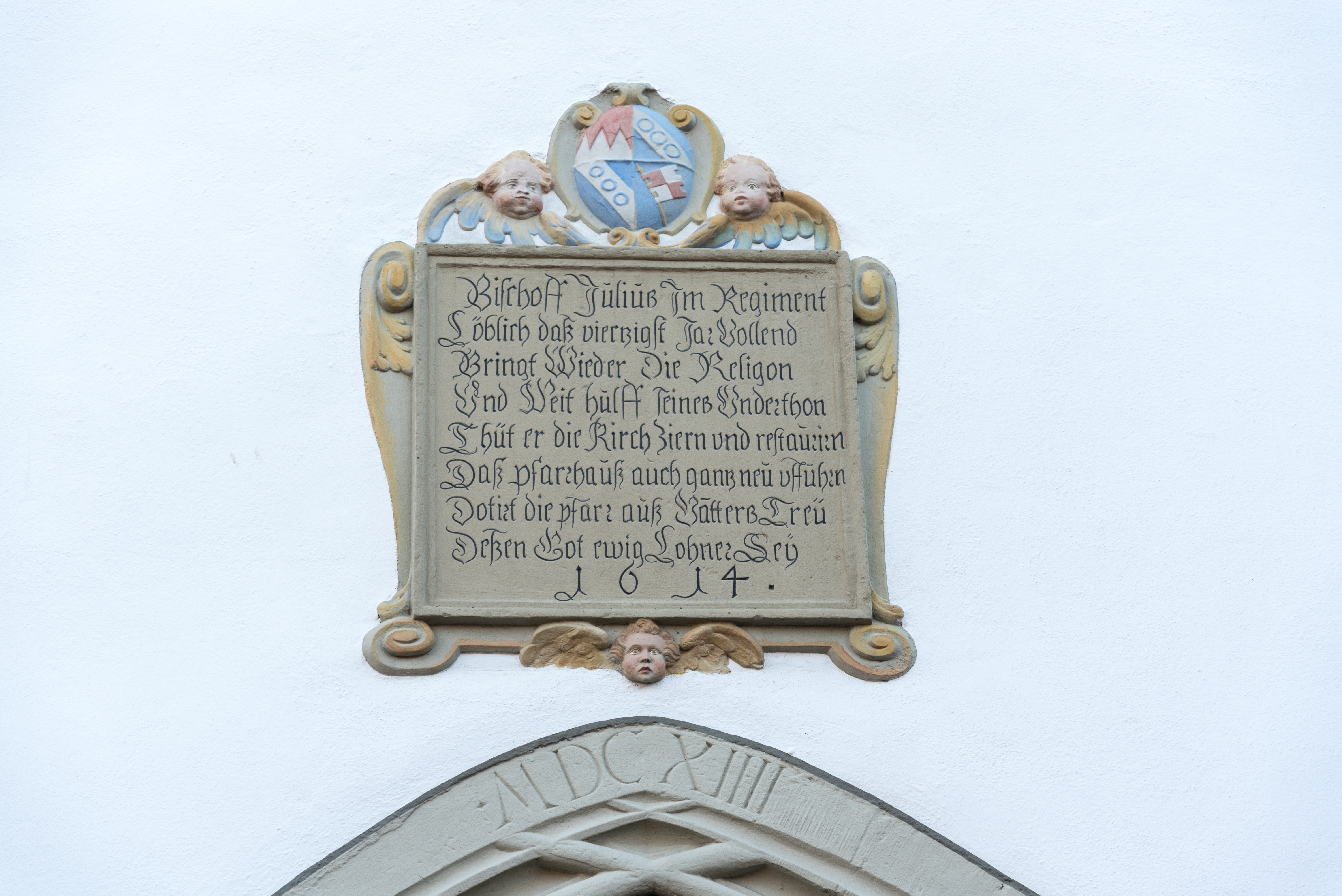 Üchtelhausen, Ebertshausen, Kath. Pfarrkirche St. Margaretha